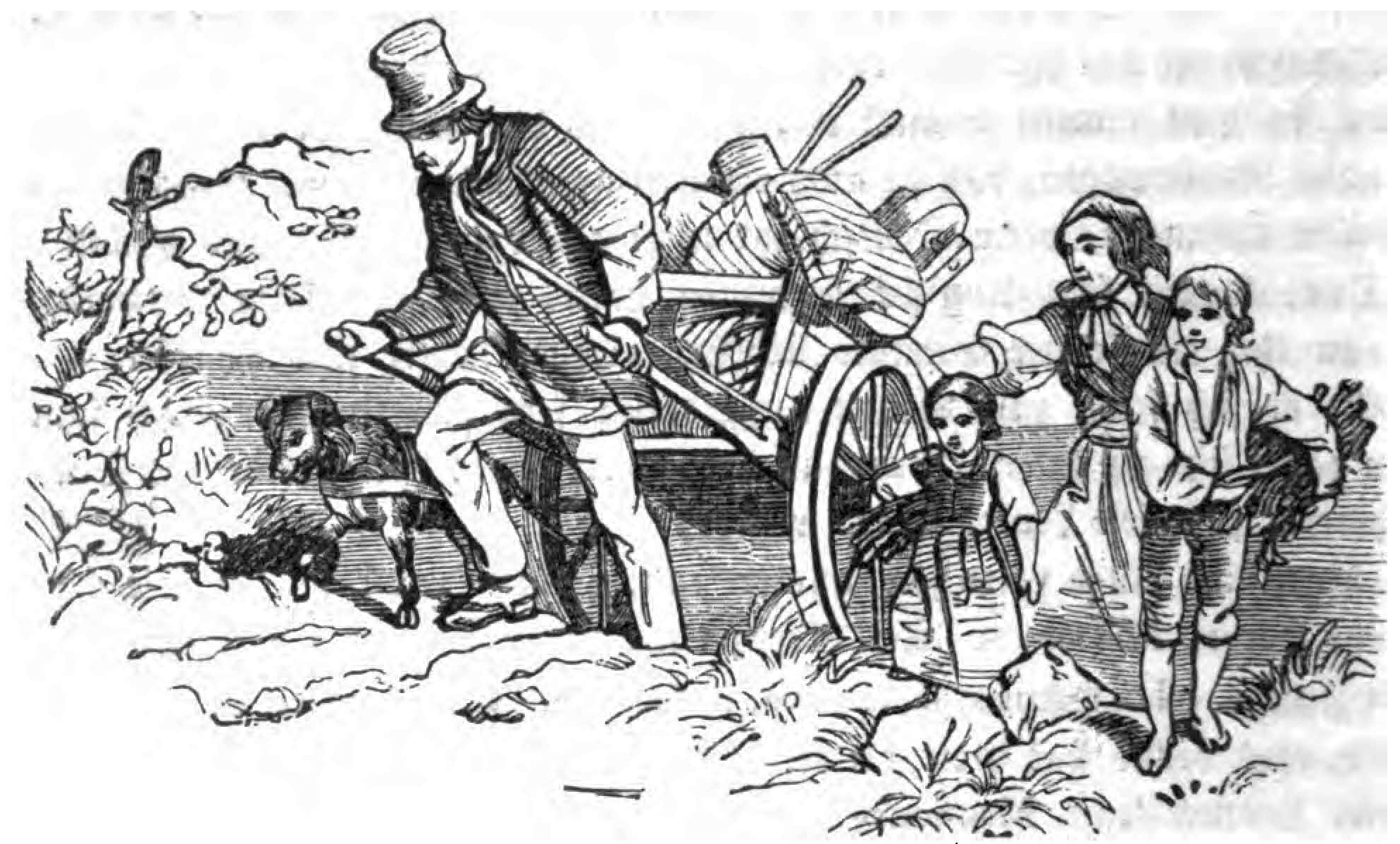 Berthold Auerbach, Schwarzwälder Dorfgeschichten, Florian und Kreszenz. – Florian und Kreszenz ziehen mit ihren Kindern als Scherenschleifer übers Land.